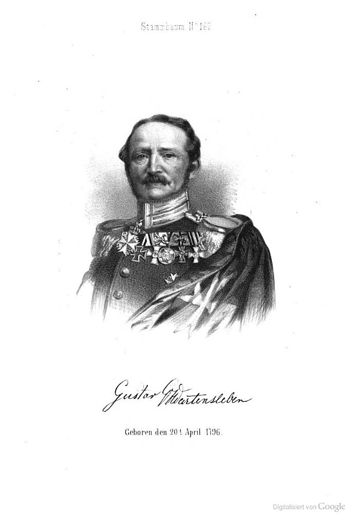 Gustav von Wartensleben (* 20. April 1796 ; † 29. Januar 1886) Generalleutnan